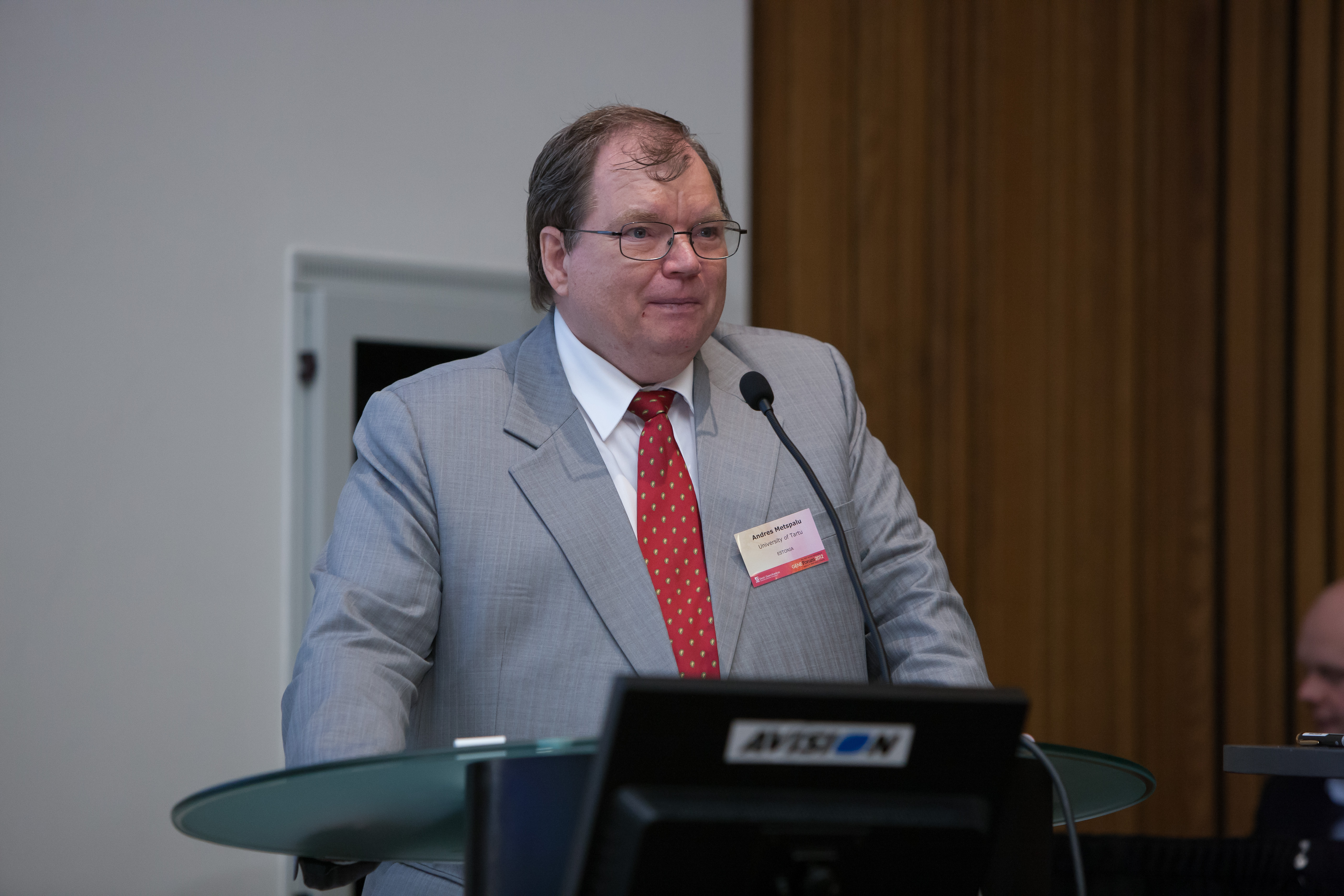 8.-9. juunil 2012 toimus Tartus kaheteistkümnes rahvusvaheline teaduskonverents Geenifoorum 2012 alapealkirjaga “Geneetilised assotsiatsiooniuuringud”. Konverentsi 1. päev. Pildil Tartu Ülikooli Eesti Geenivaramu direktor prof Andres Metspalu.